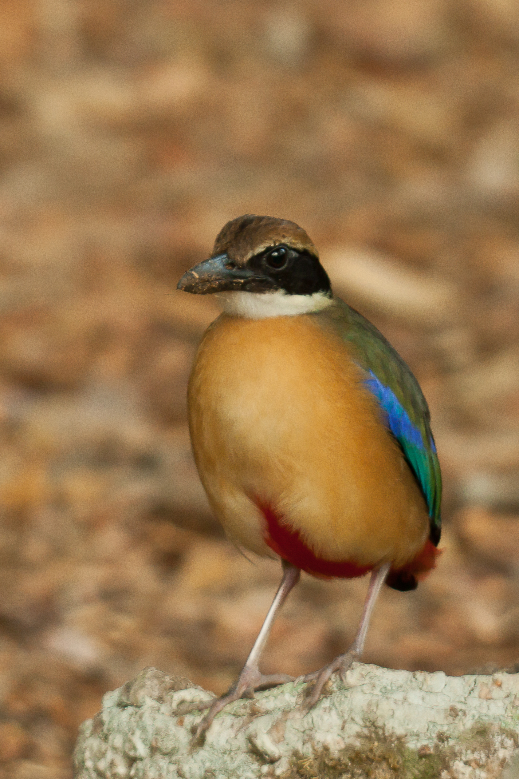 Pitta megarhyncha, Singapore Botanical Gardens, Singapore